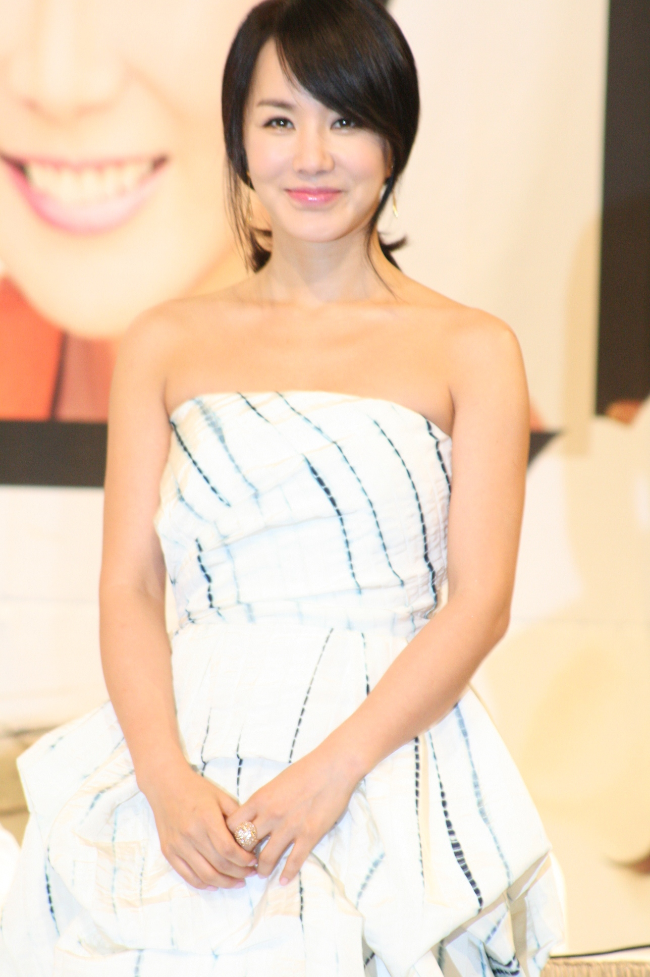 사진 050